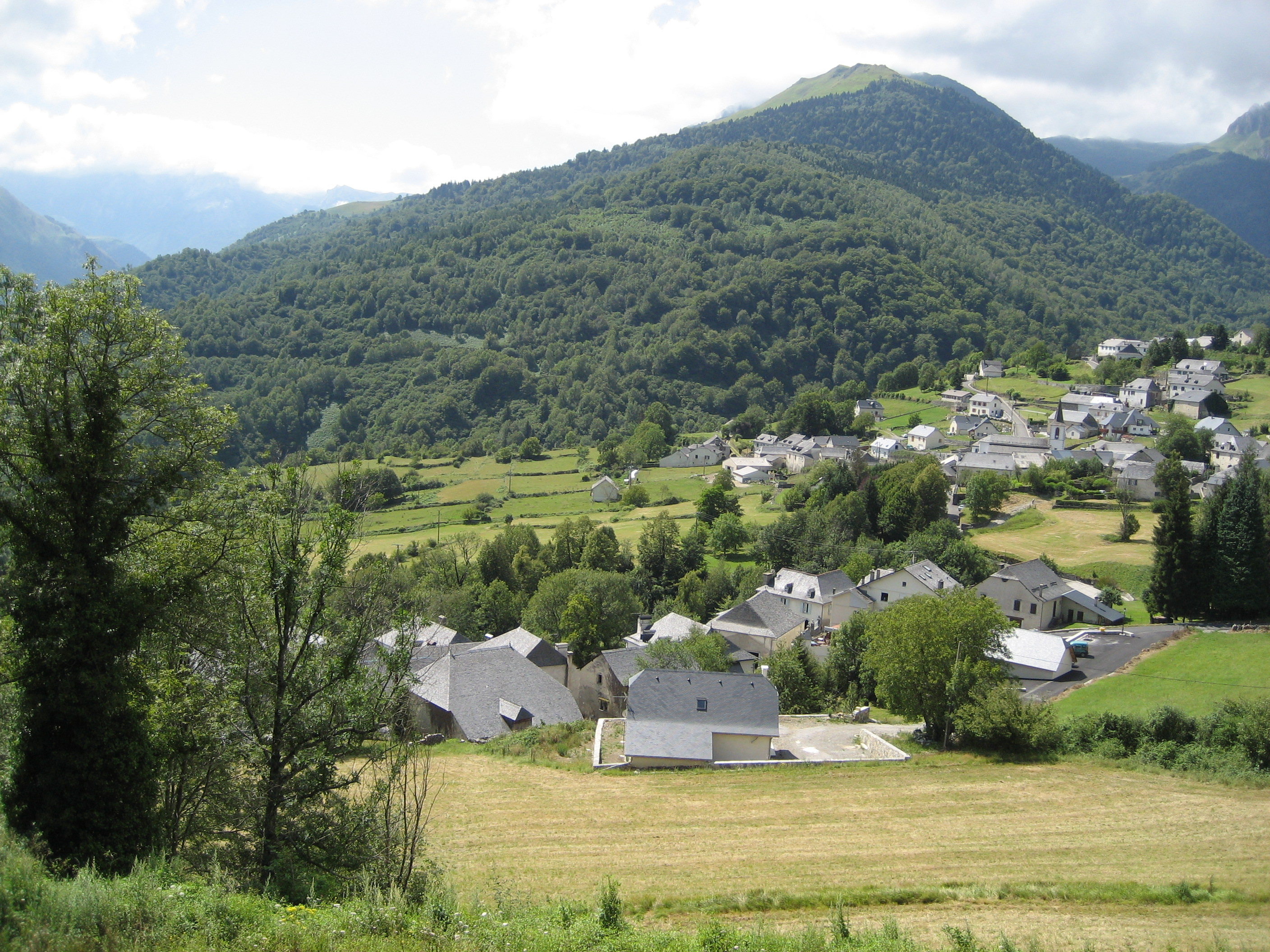 France, Pyrénées-Atlantiques (64), Bilhères